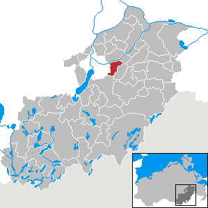 Sponholz in Mecklenburg-Vorpommern, Landkreis Mecklenburg-Strelitz